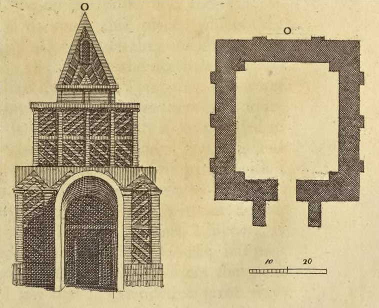 O et O de la 22e planche du 2e volume d'A Description of the East de Richard Pococke